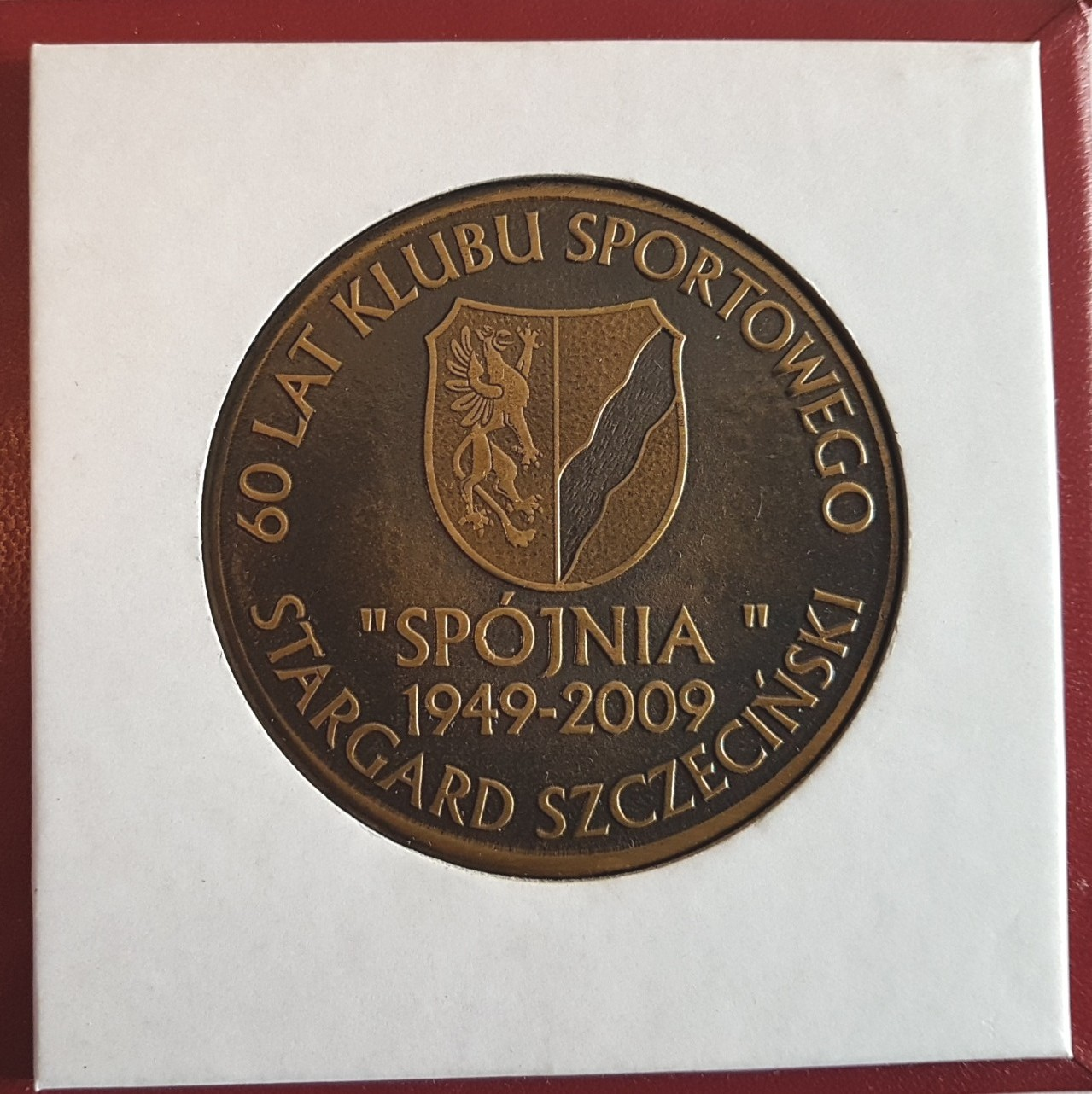 Medal Spójni Stargard 1949 - 2009